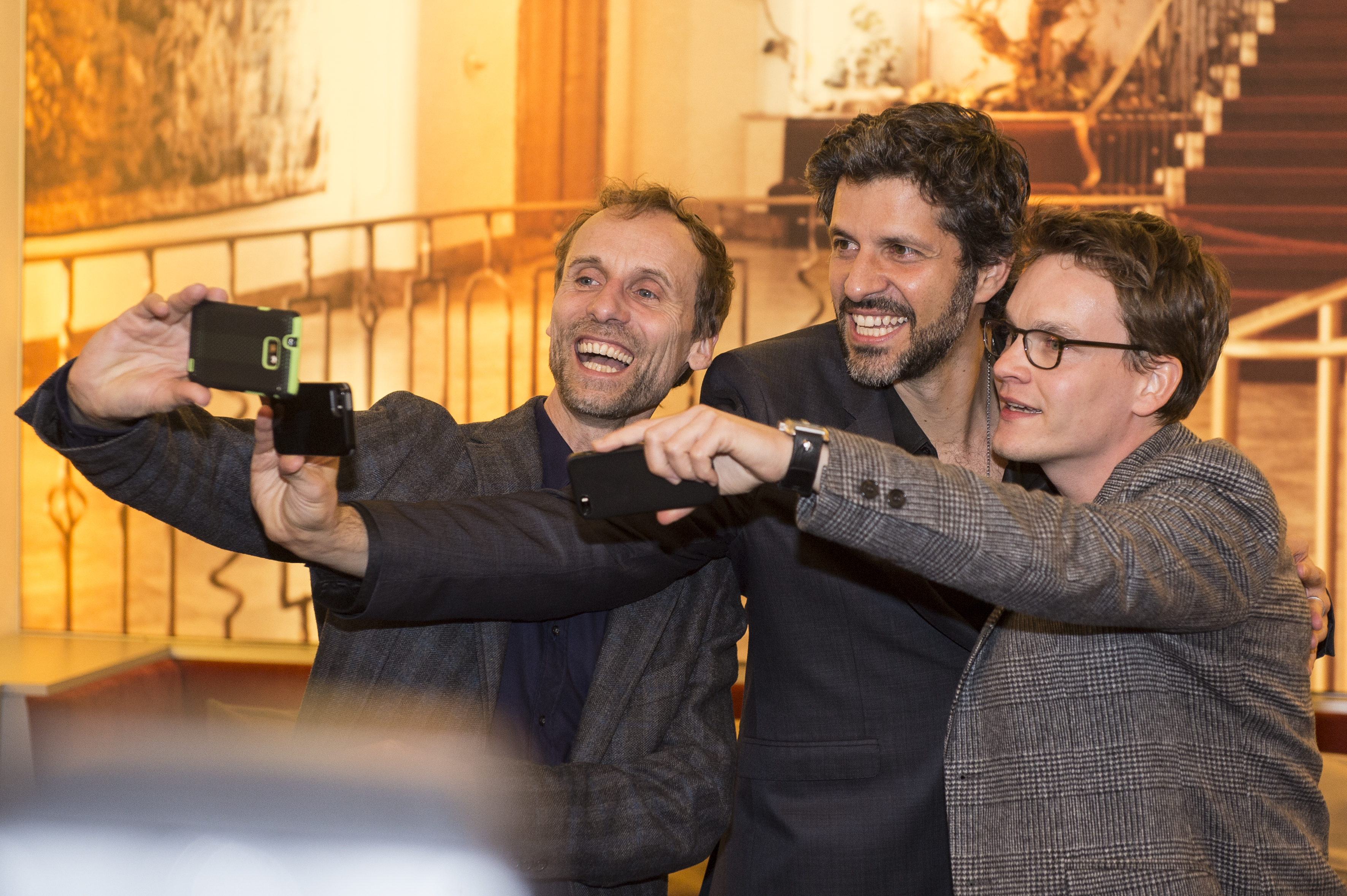 Bretonische Verhältnisse Premiere am 16.04.2014 in München Jan Georg Schütte, Pasquale Aleardi, Ludwig Blochberger